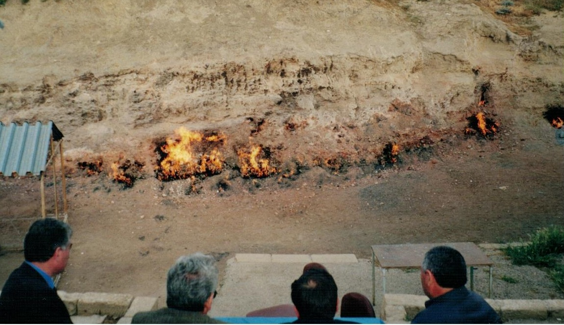 Янардаг - Янартау. Әзербайжан. Башҡортостандан килеүселәр ут янында